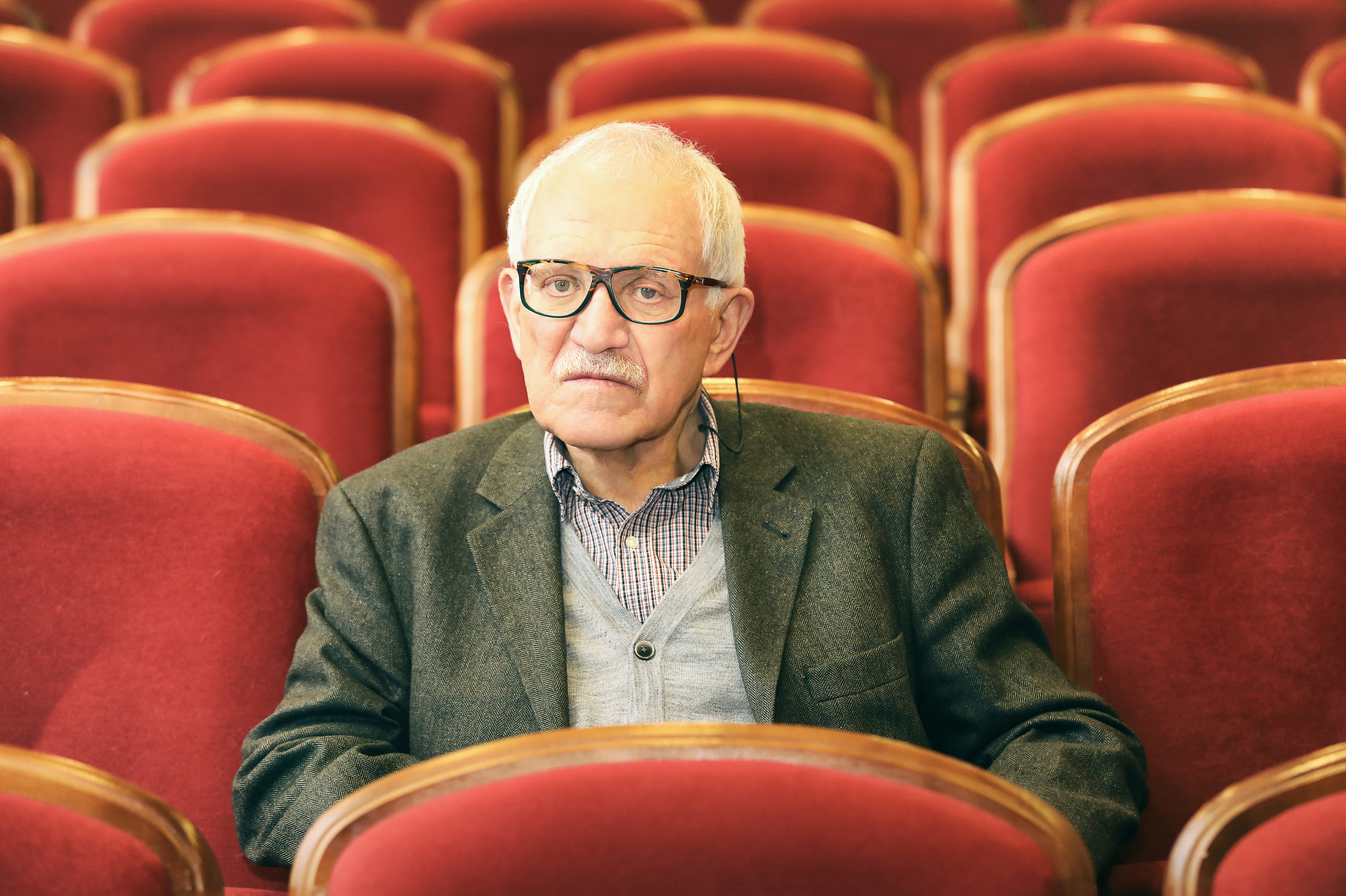 Кинорежиссёр Александр Наумович Митта в концертном зале Российской государственной детской библиотеки.